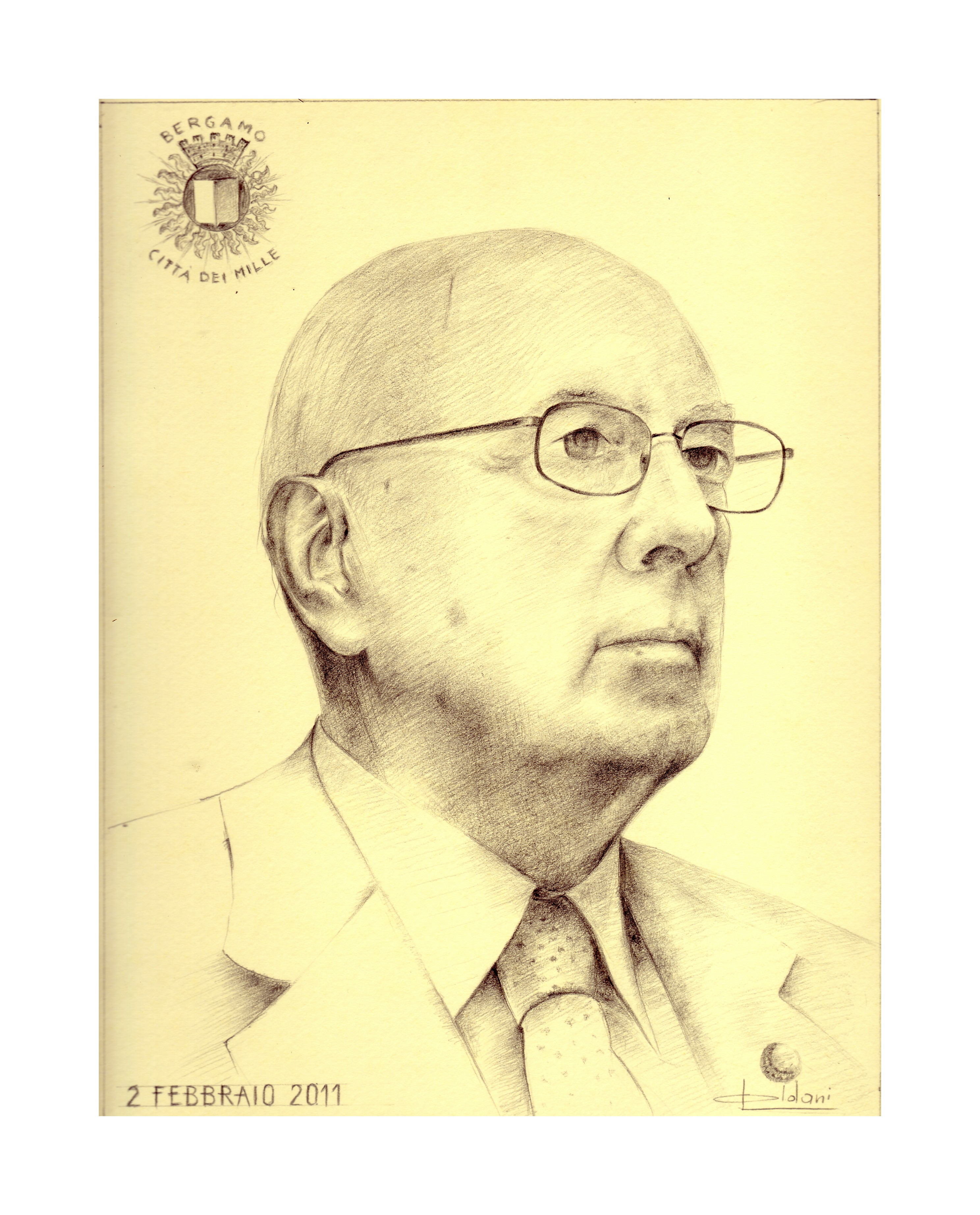 Giorgio Napolitano. Opera realizzata dall'artista Luigi Oldani